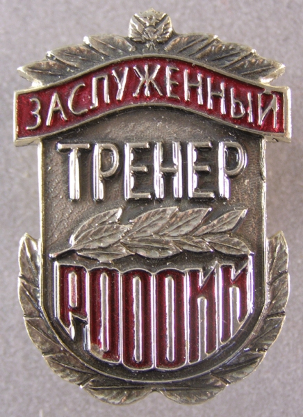 Знак "Заслуженный тренер России" с 2005 года